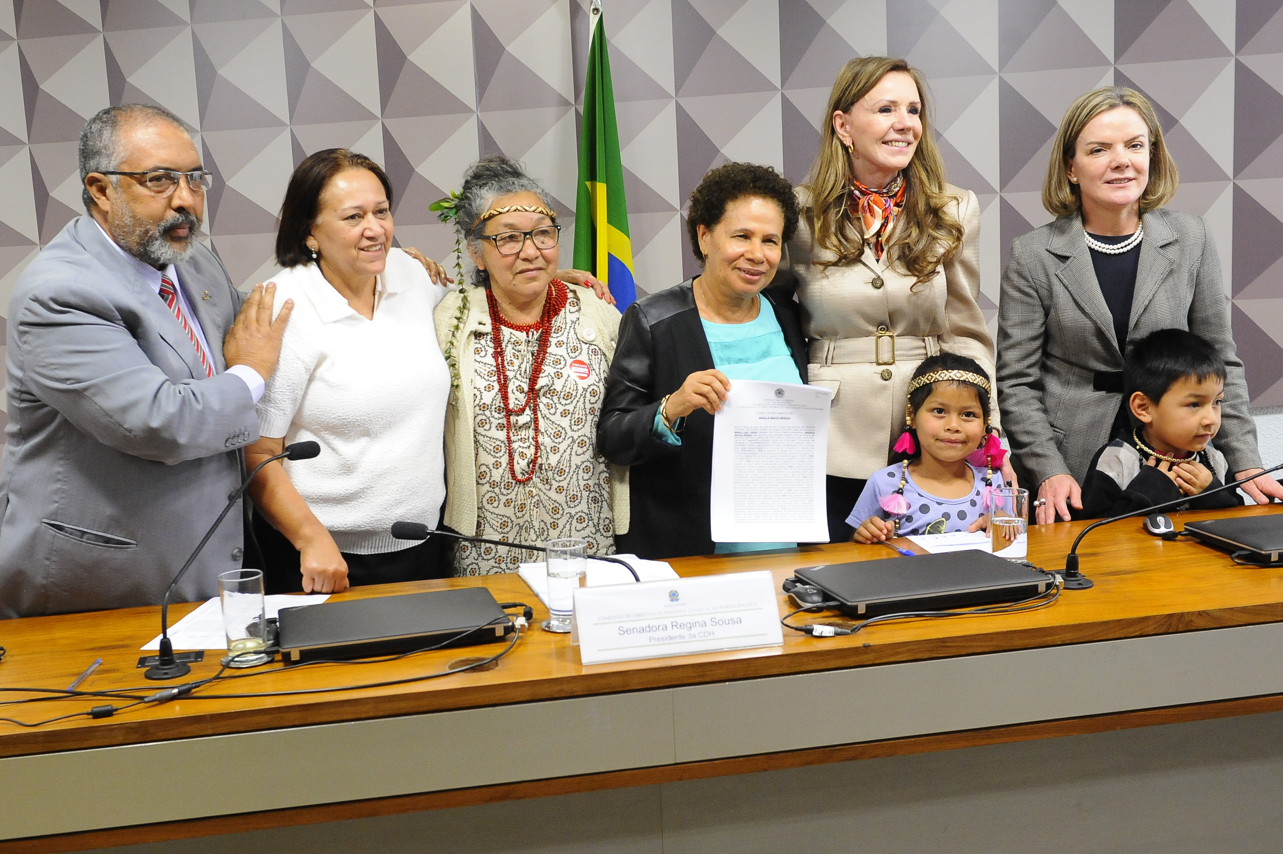 Comissão de Direitos Humanos e Legislação Participativa (CDH) realiza apreciação das emendas ao PLN 1/2017 (LDO 2018). Na sequência, deliberativa com 19 itens, entre eles, o PLS 650/2011, que propõe demandas de acessibilidade no âmbito do Programa Minha Casa Minha Vida. Representante indígena entrega aos senadores denúncia de assédio moral e sexual que estariam ocorrendo no Distrito da Região Sul. Mesa: senadora Fátima Bezerra (PT-RN); vice-presidente da CDH, senador Paulo Paim (PT-RS); presidente da CDH, senadora Regina Sousa (PT-PI); senadora Vanessa Grazziotin (PCdoB-AM); senadora Gleisi Hoffmann (PT-PR) Foto: Pedro França/Agência Senado